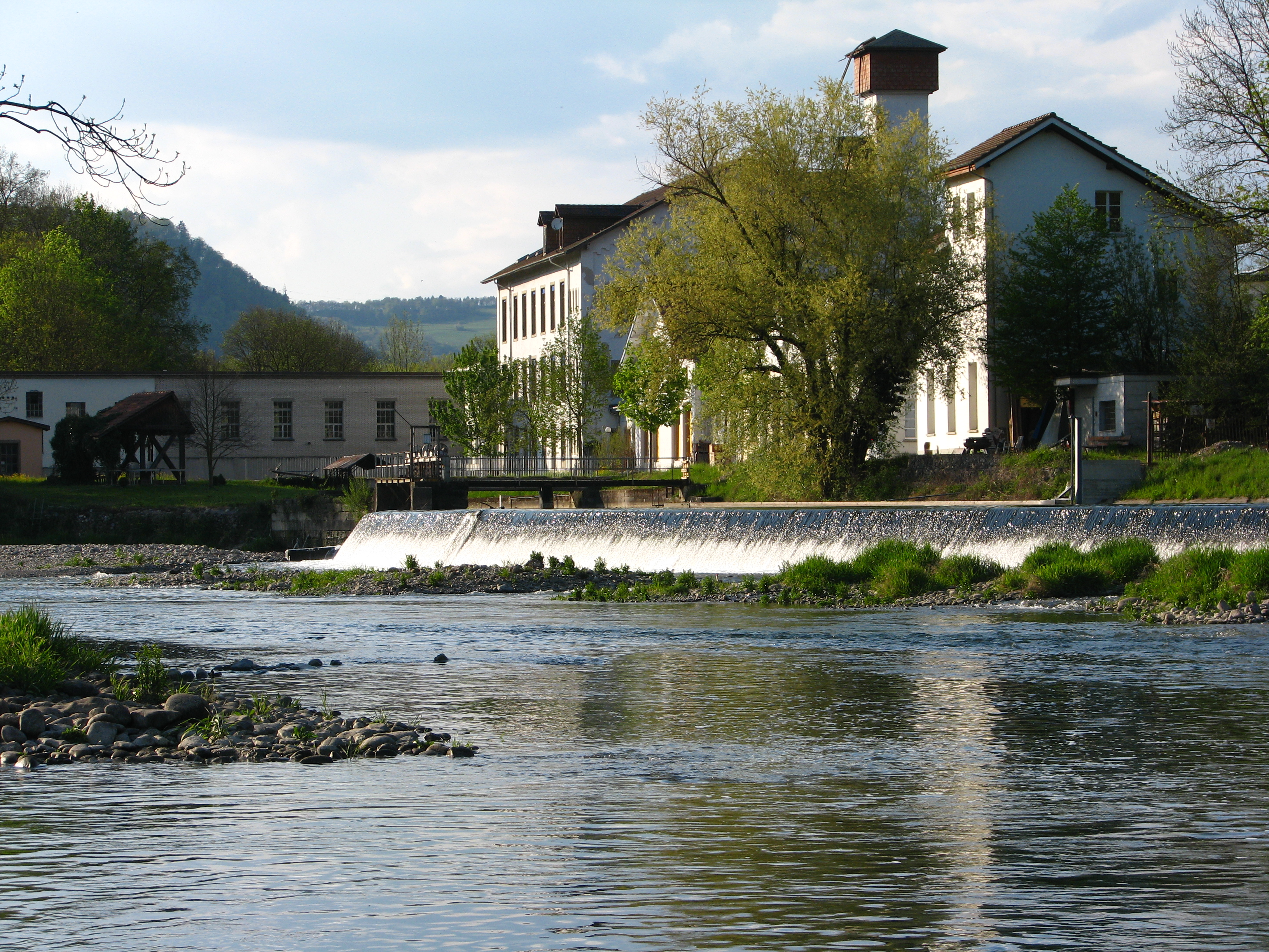 Limmat in Vogelsang (Gebenstorf), Gebäude im Hintergrund in Untersiggenthal